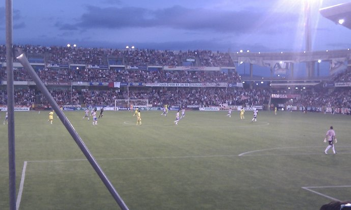 Estadio Nuevo Los Cármenes, en la ciudad de Granada (España), durante el partido Granada CF vs Villarreal B, en el que el Granada ganó 3-0 al equipo castellonense.